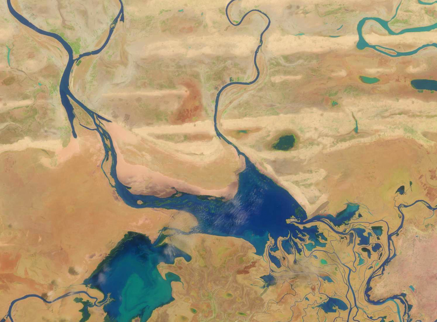 Satellitenbild des Débo-See in Mali Landsat8 aufnahme von 2014-07-08 LC81970492014189LGN00